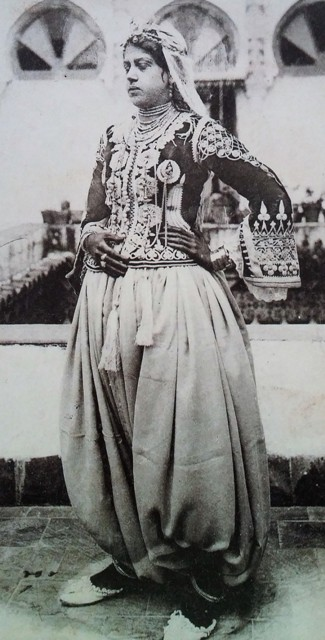 ghlila djabadouli, costume algérois, dont dérive le Karakou.